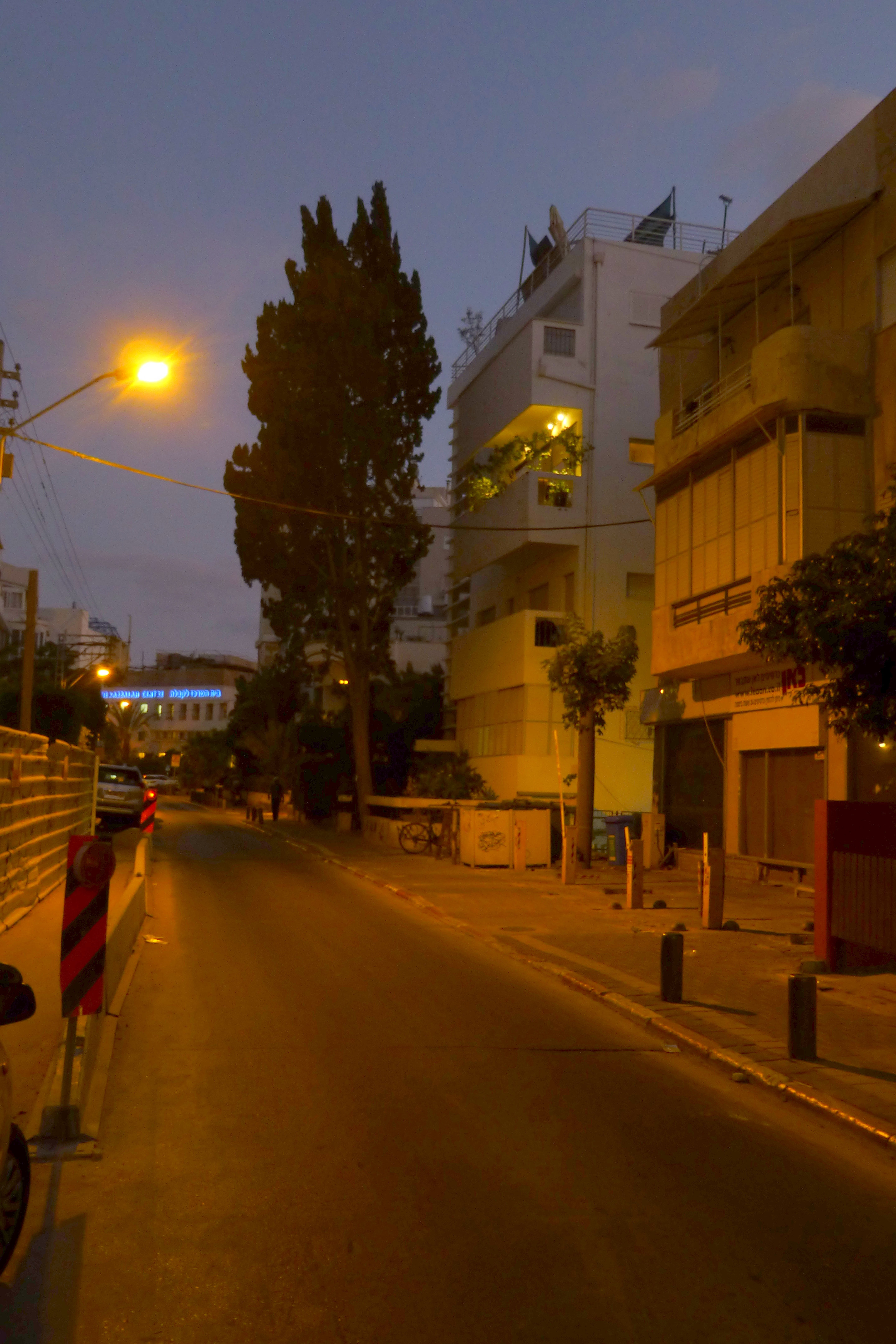 בית התרמומטר הוא בית מגורים בתל אביב הבנוי בסגנון הבינלאומי (המכונה גם סגנון הבאוהאוס).